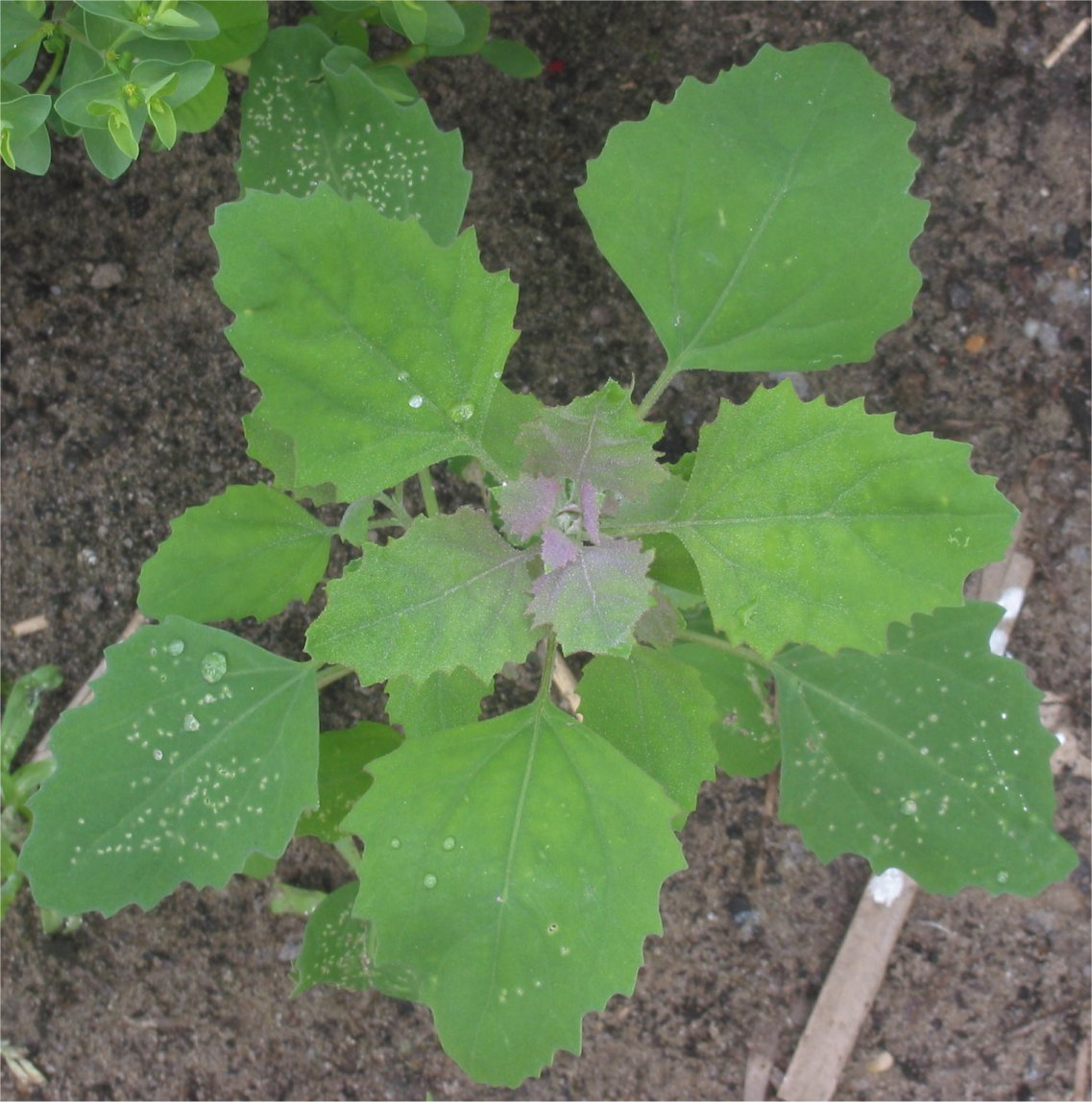 Melganzenvoet eivormige bladeren Chenopodium album